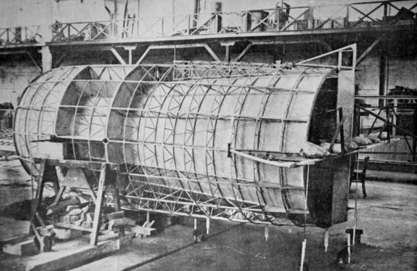 Fasi di costruzione della carlinga dell'aero sperimentale: Stipa-Caproni.